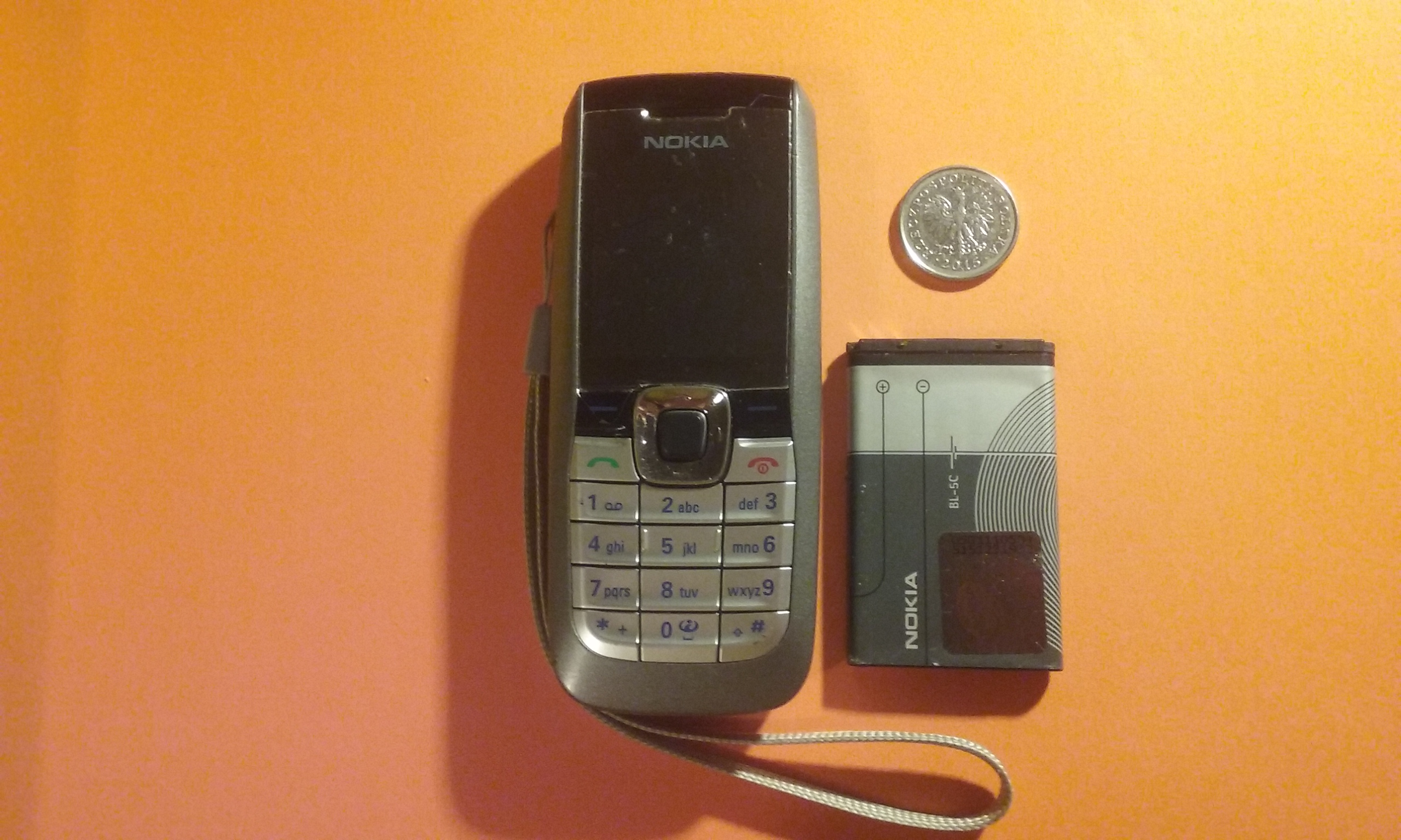 Nokia 2610 z baterią BL-5C